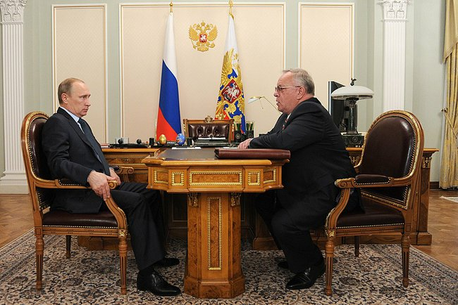 Рабочая встреча с исполняющим обязанности Главы Республики Алтай Александром Бердниковым